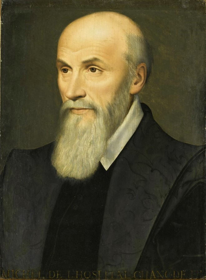 Portrait du chancelier Michel de l'Hospital. Huile sur bois.